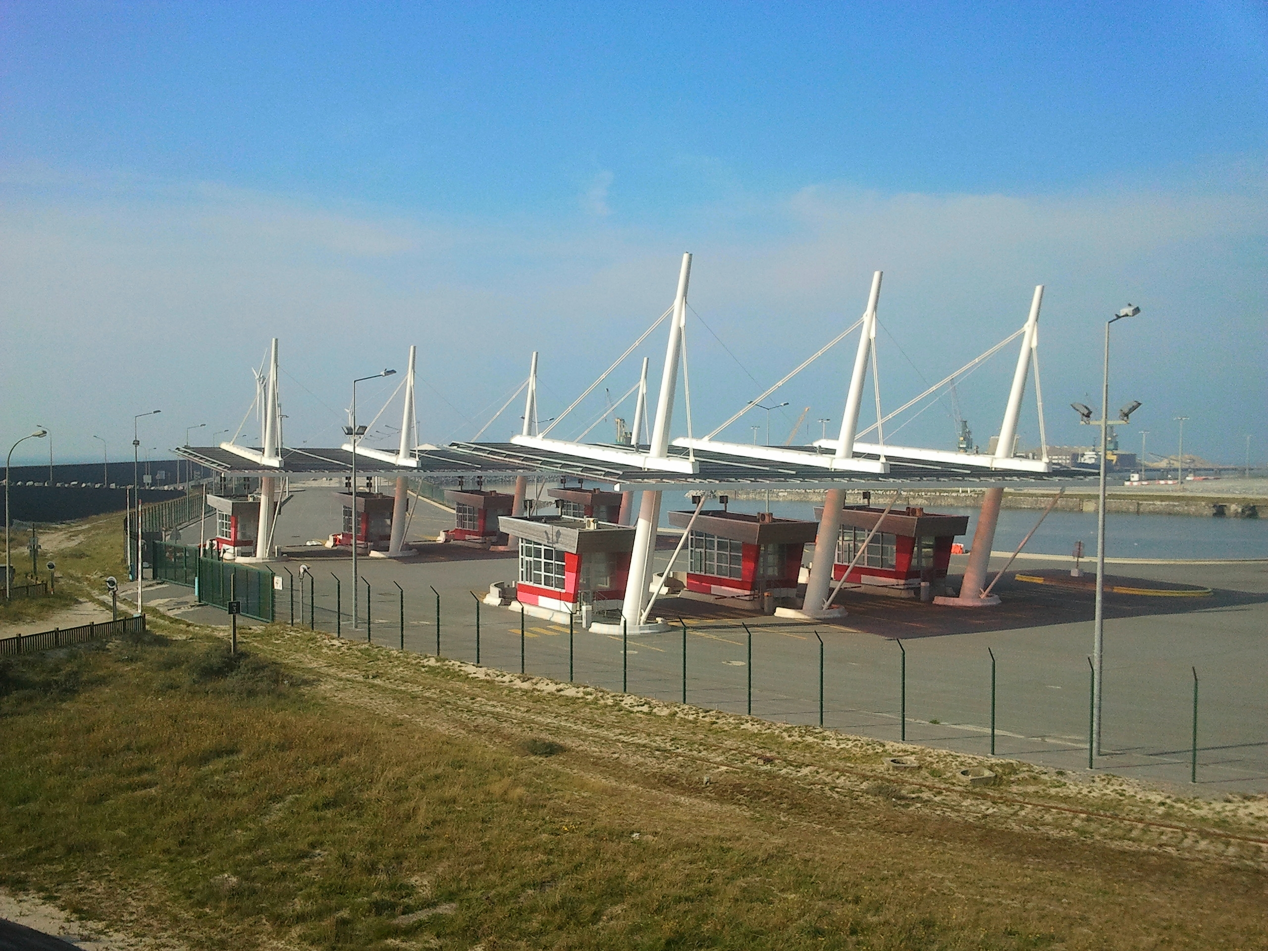 Nouveau hub-port de Boulogne-sur-Mer, construit en 2009